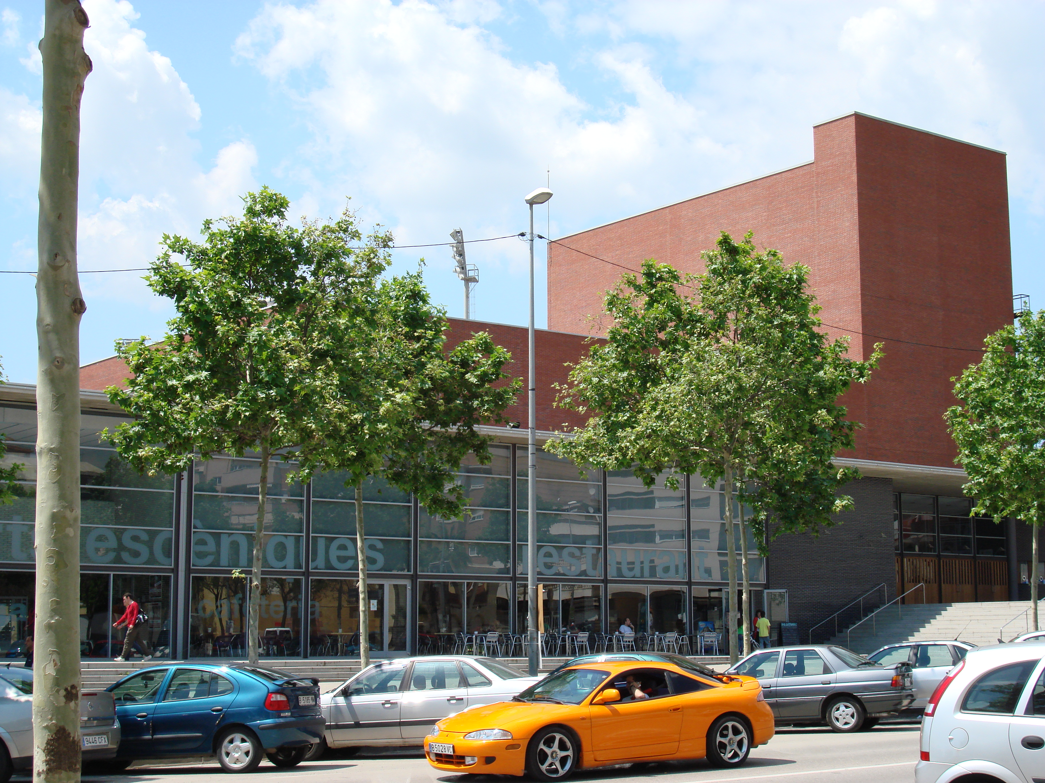 Edifici multimodal: tres sales de teatre, piscines climatitzades, gimnàs, pistes de pàdel i camp de futbol. També compta amb bar i restaurant, així com algunes botigues esportives.